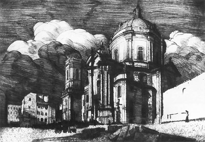 Kościół Dominikanów we Lwowie, etching, National Museum in Kraków